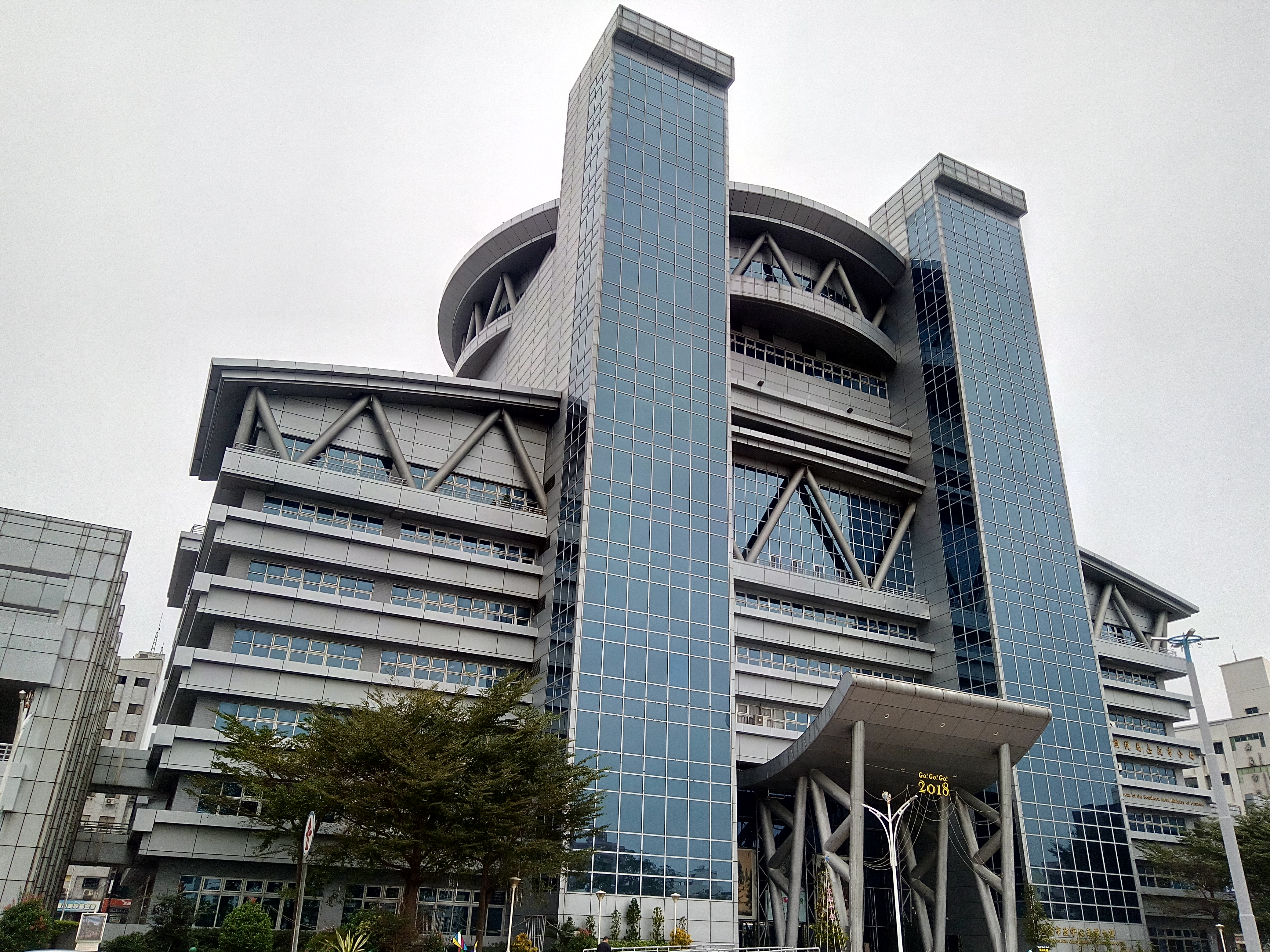 嘉義市政府庁舎